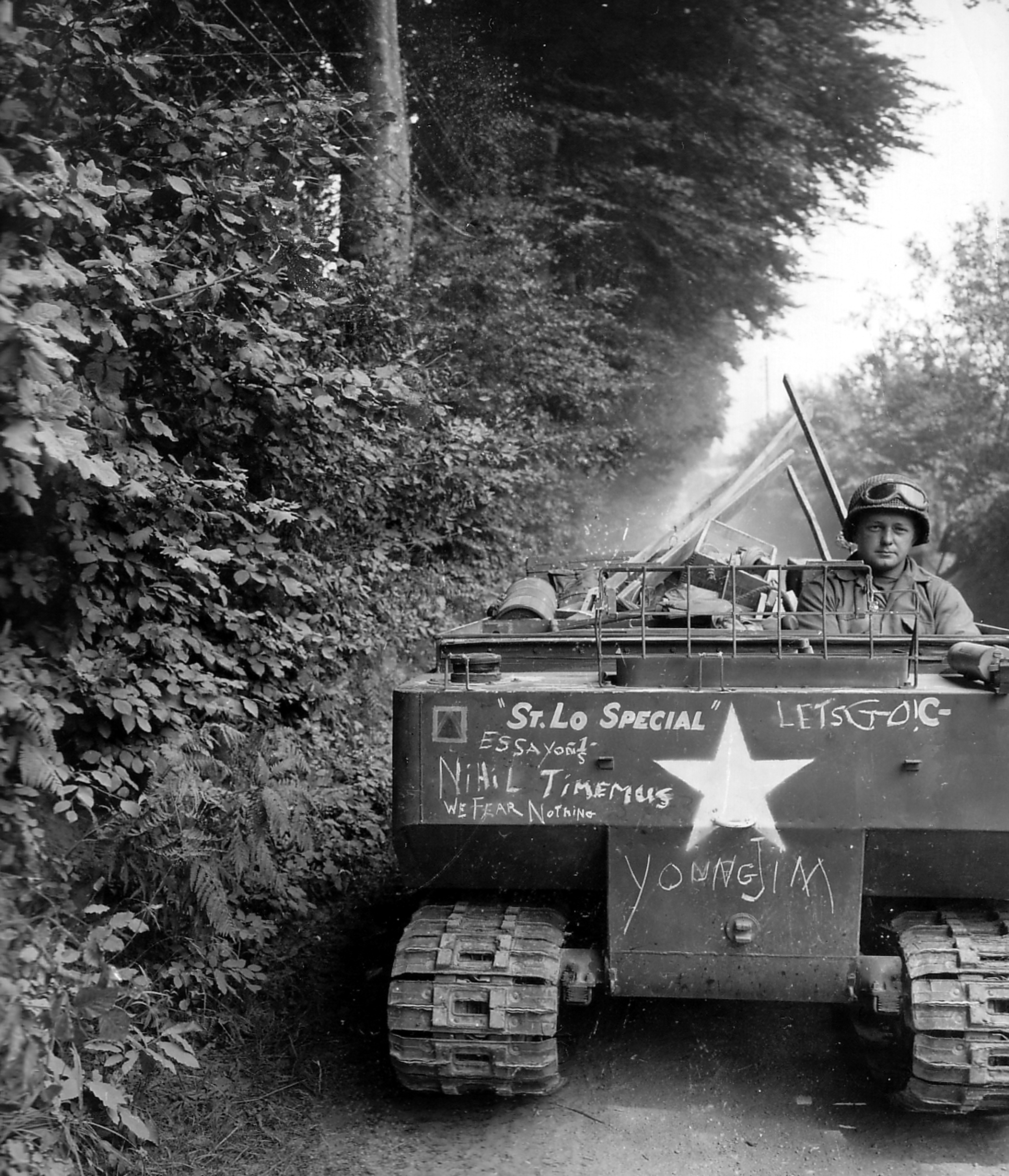 Un M-29 " Weasel" de la Charlie Co du 121st Eng Combat Bn (ECB) de la 29th US ID Le "Weasel" véhicule chenillé américain de transport tout terrains, capacité 4 hommes et 400kg Conçu par Studebaker, il est particulièrement adapté aux terrains difficiles: boue, neige, sable, marais... Outre le transport de ravitaillement et de munitions il servit aussi dans les unités de transmissions. L'engin est copieusement tagué : St. Lo Special 1 Young Jim let's go essayons Nihil Timemus We fear nothing Explications : Young Jim certainement le nom de baptême du M-29 29th Let's Go" devise de la 29th Inf.Div. US "Essayons" devise du Corps of Engineers (la devise est en français) Nihil Timemus locution latine avec sa traduction We fear nothing soit nous n'avons peur de rien, devise du 163rd Military Police Battalion Pour aller plus loin : Le même engin a été filmé en ville, voir ici